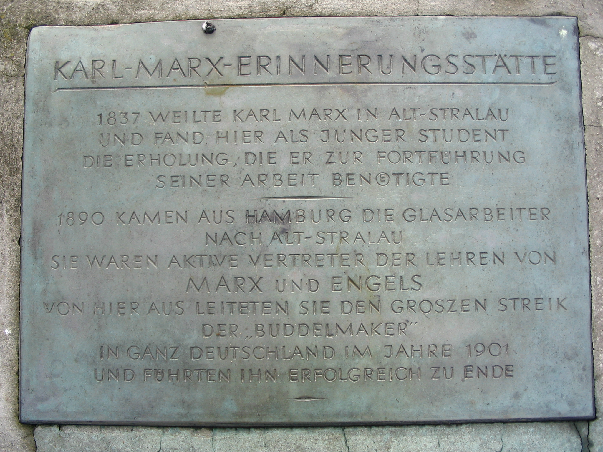 Karl Marx Erinnerungstafel in Berlin-Stralau